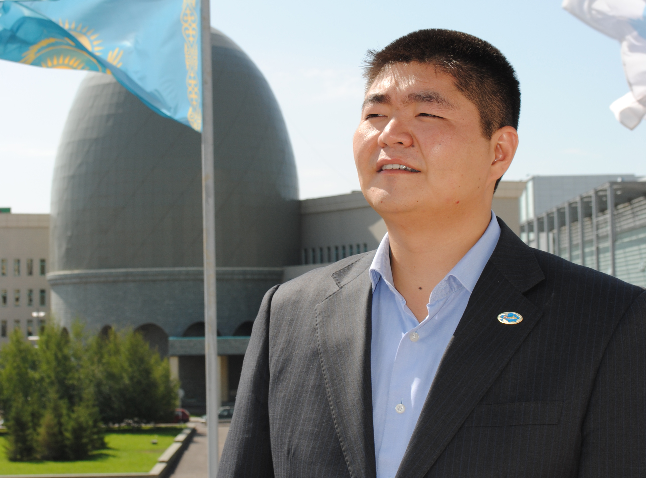 Nurlan Uteshev